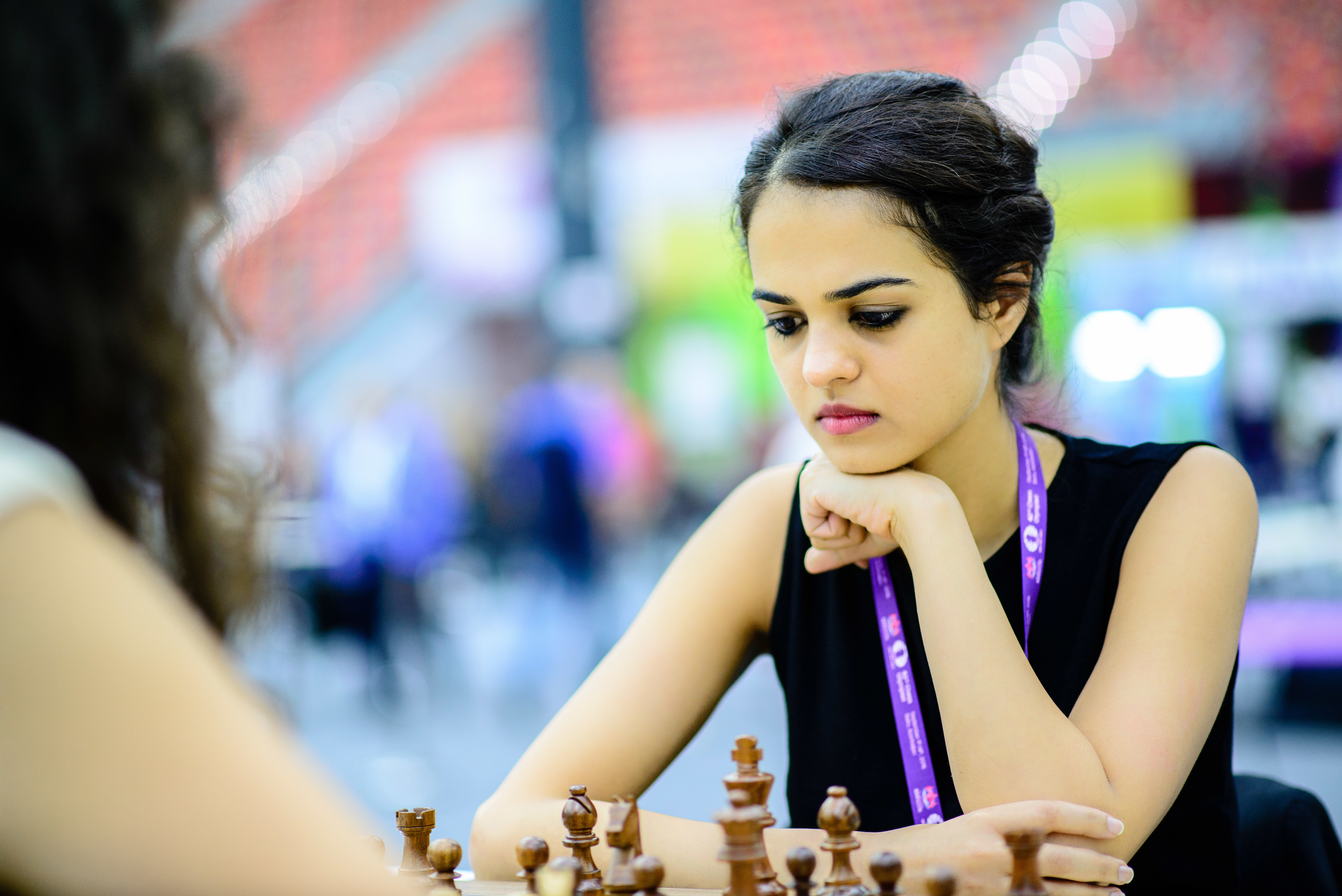 Tania Sachdev